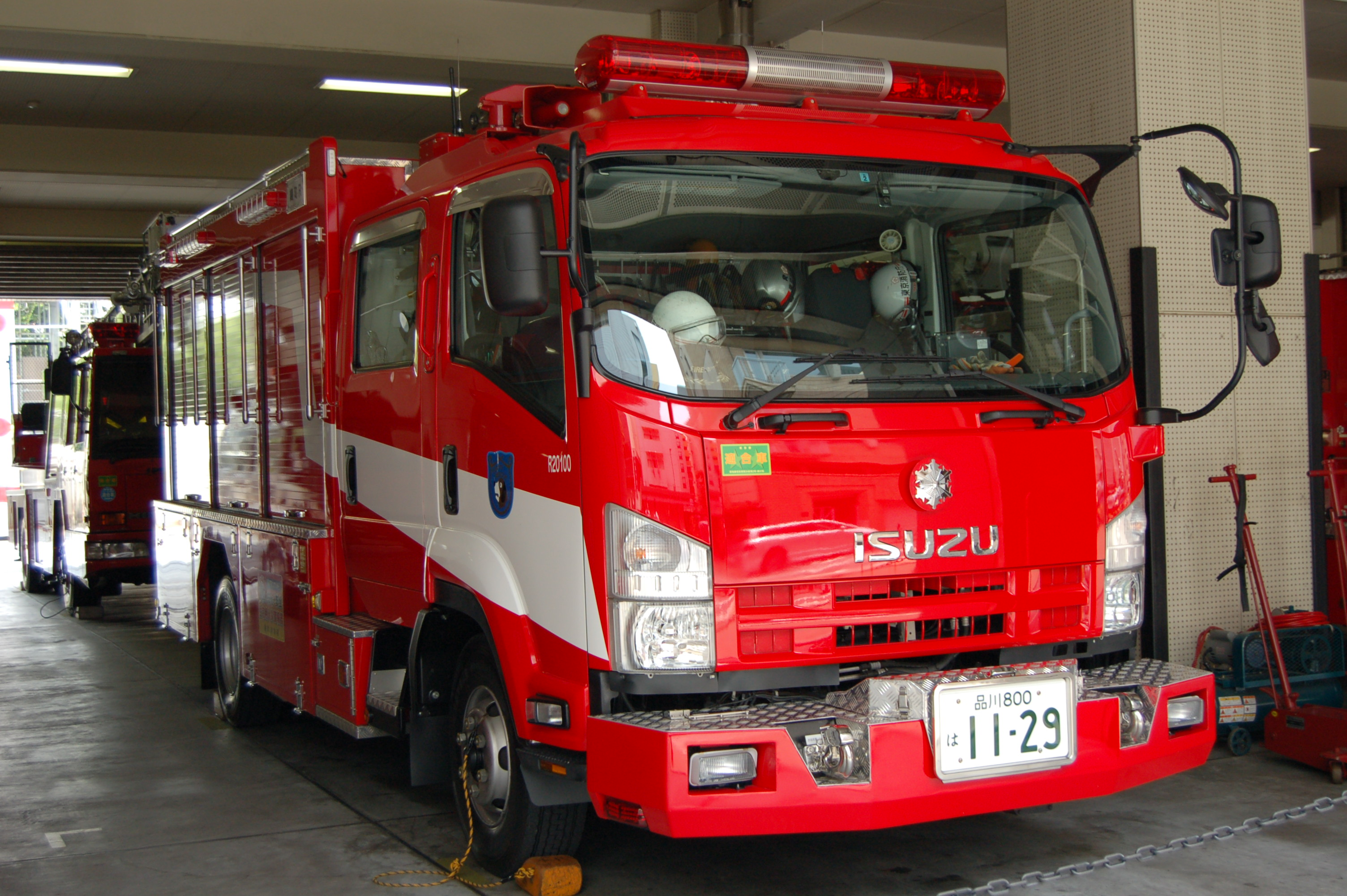 東京消防庁麹町消防署麹町救助1